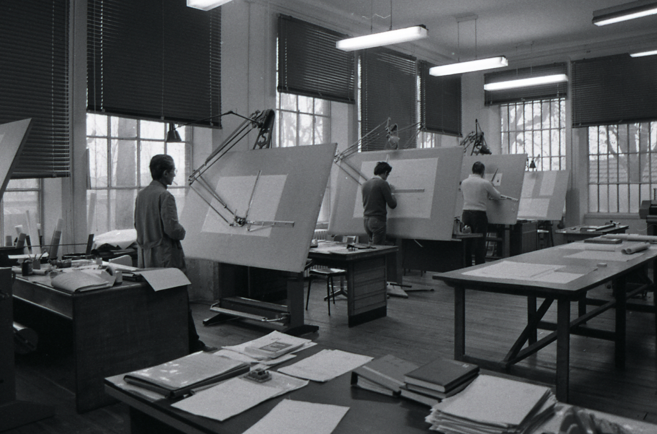 Lombardia, Milano? Stabilimenti industriali. Servizio fotografico : Milano, 1980 / Paolo Monti. - Strisce: 5, Fotogrammi complessivi: 26 : Negativo b/n, gelatina bromuro d'argento/ pellicola ; 35 mm. - ((Sul portanegativi: [Kodak Tri-X Pan].